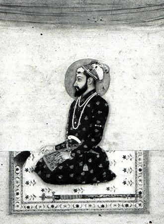 Der Großmogul Aurangzeb (* 1618 / † 1707) um etwa 1660.